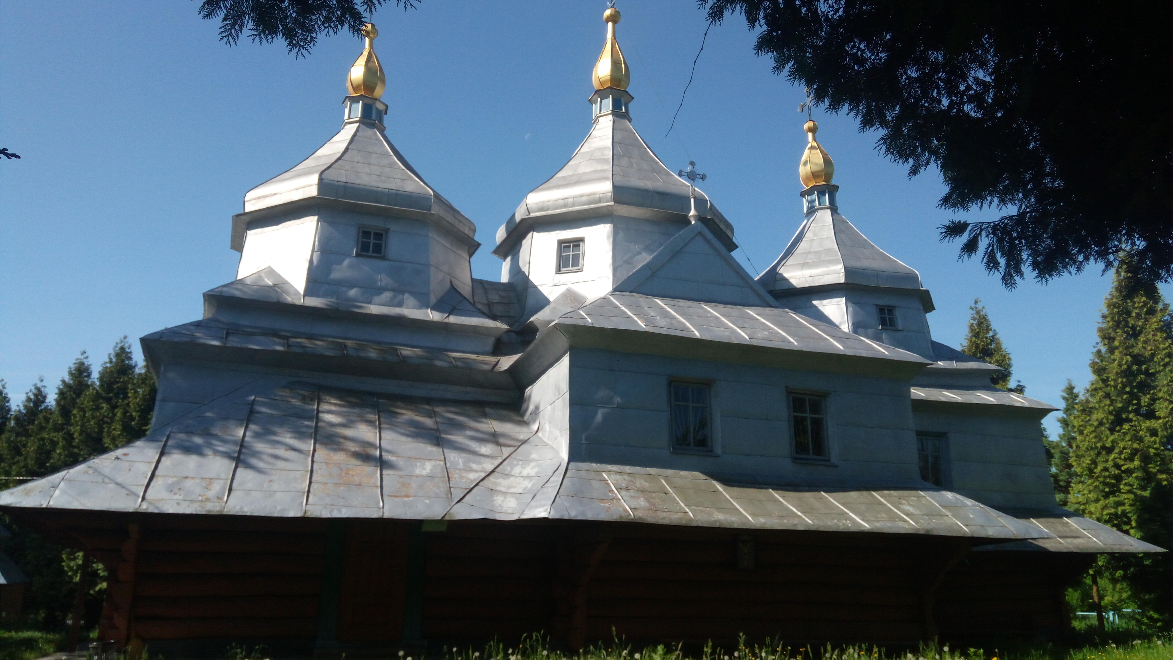 Церква Вознесіння Ісуса Христа (1806)